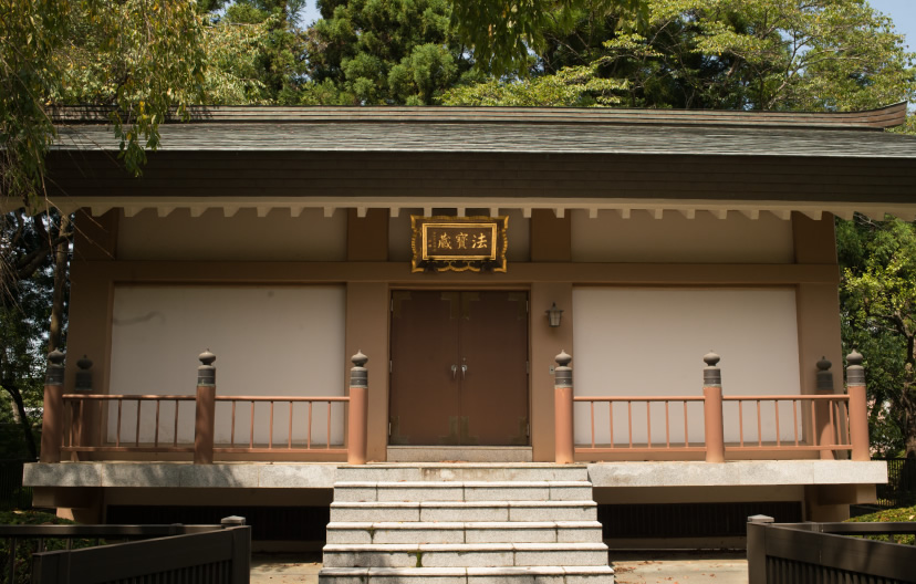 六地蔵寺法寳蔵